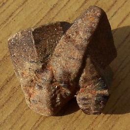 staurolit, pochodzenie Madagaskar, autor zdjęcia Sebastian Socha 11.10. 2006 r.